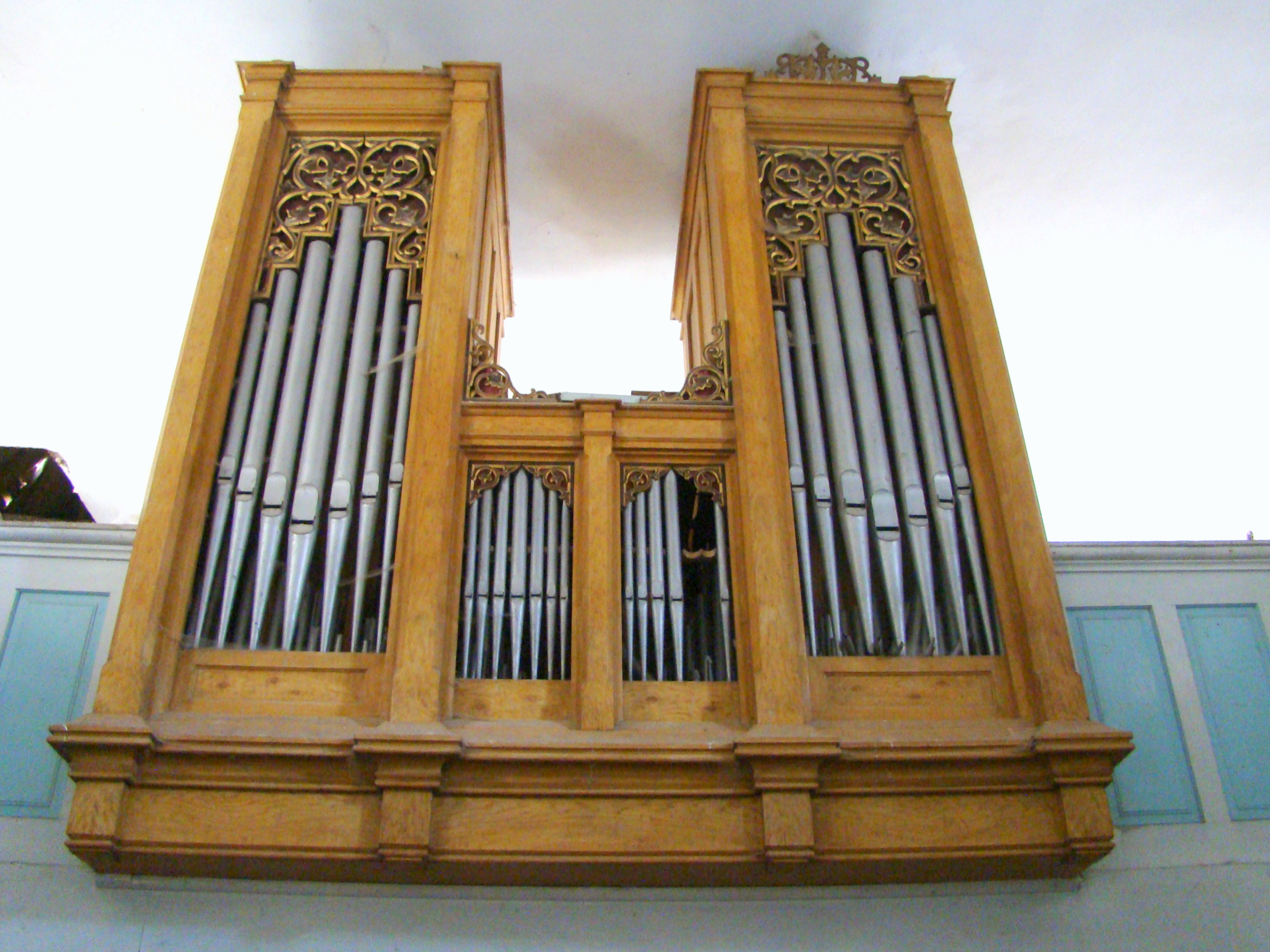 Ansamblul bisericii evanghelice, sat Ormeniș; comuna Viișoara Str. Principală 204 sec. XVI - XVIII